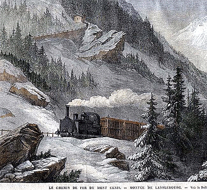 Le train Fell du Mont-Cenis, ligne construite par ordre de Napoléon III par l'Anglais John Barraclough Fell, suite à des retard dans les travaux du Tunnel Modane-Bardonechia. Ouvert en 1865, la ligne sera démonte en 1871 après l'ouverture du Tunnel.